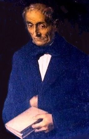 Francescantonio del Mercato